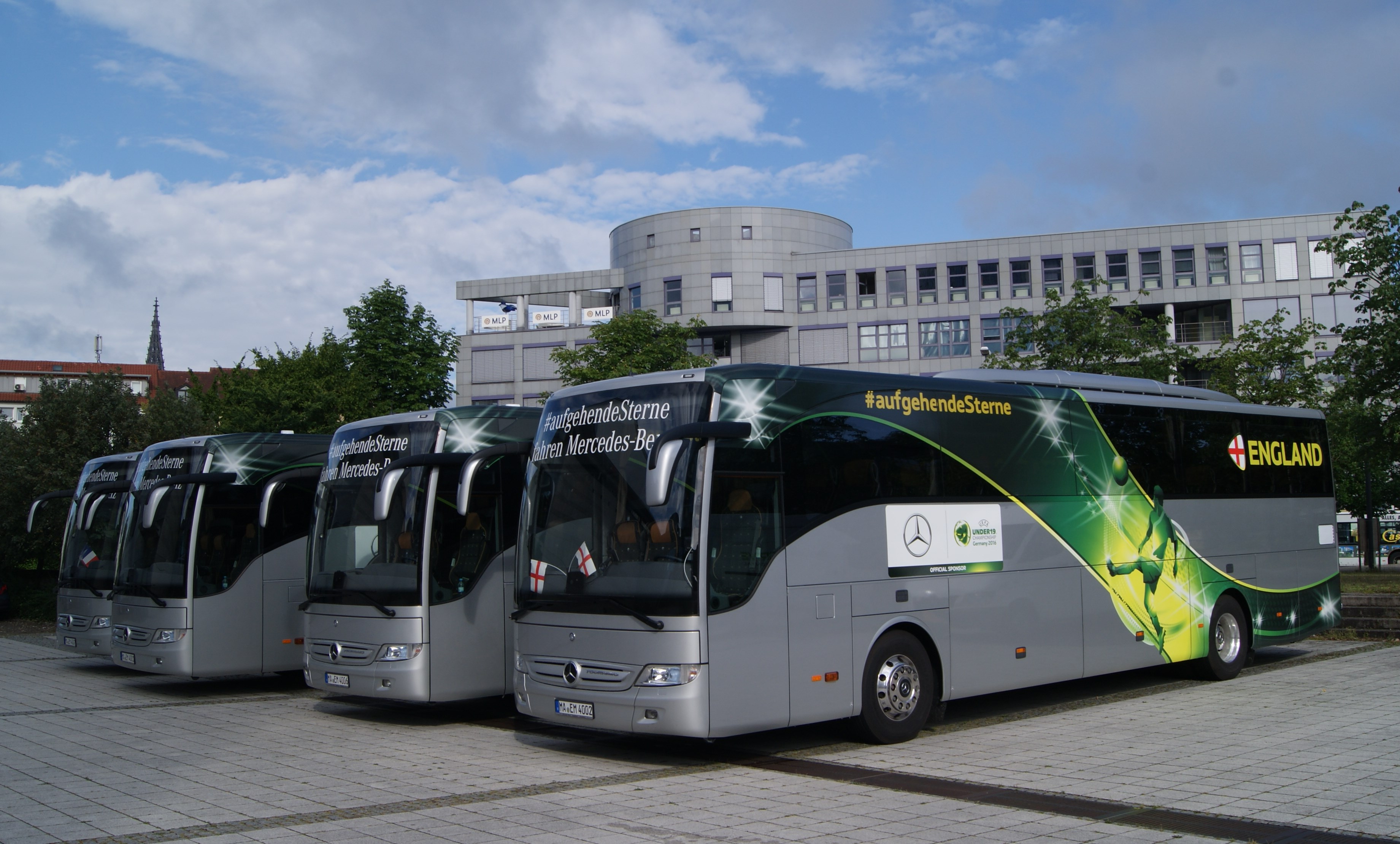 U-19-Fußball-Europameisterschaft 2016 Teambus England in Ulm